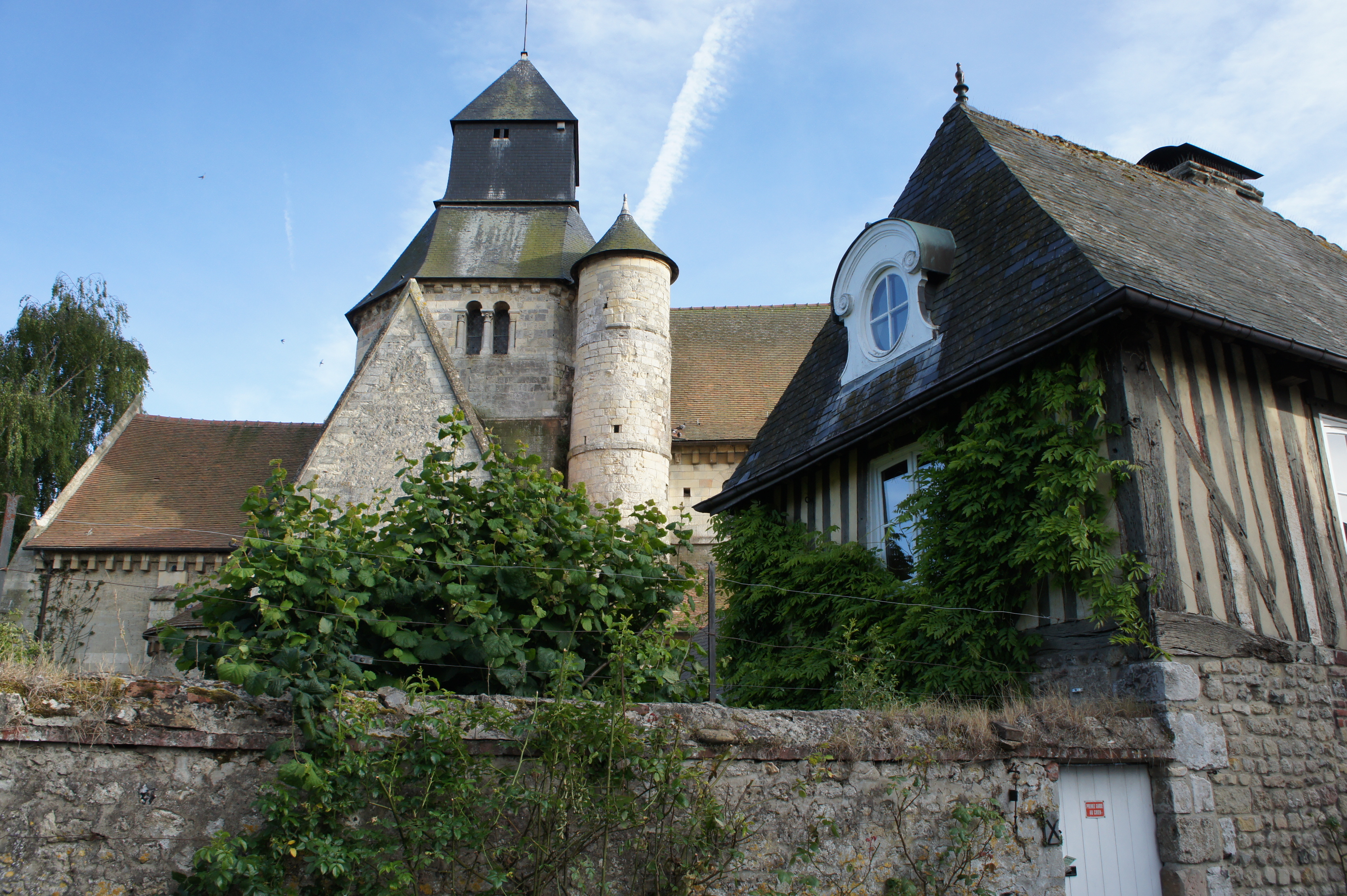 Facade nord église Saint Pierre de Touques